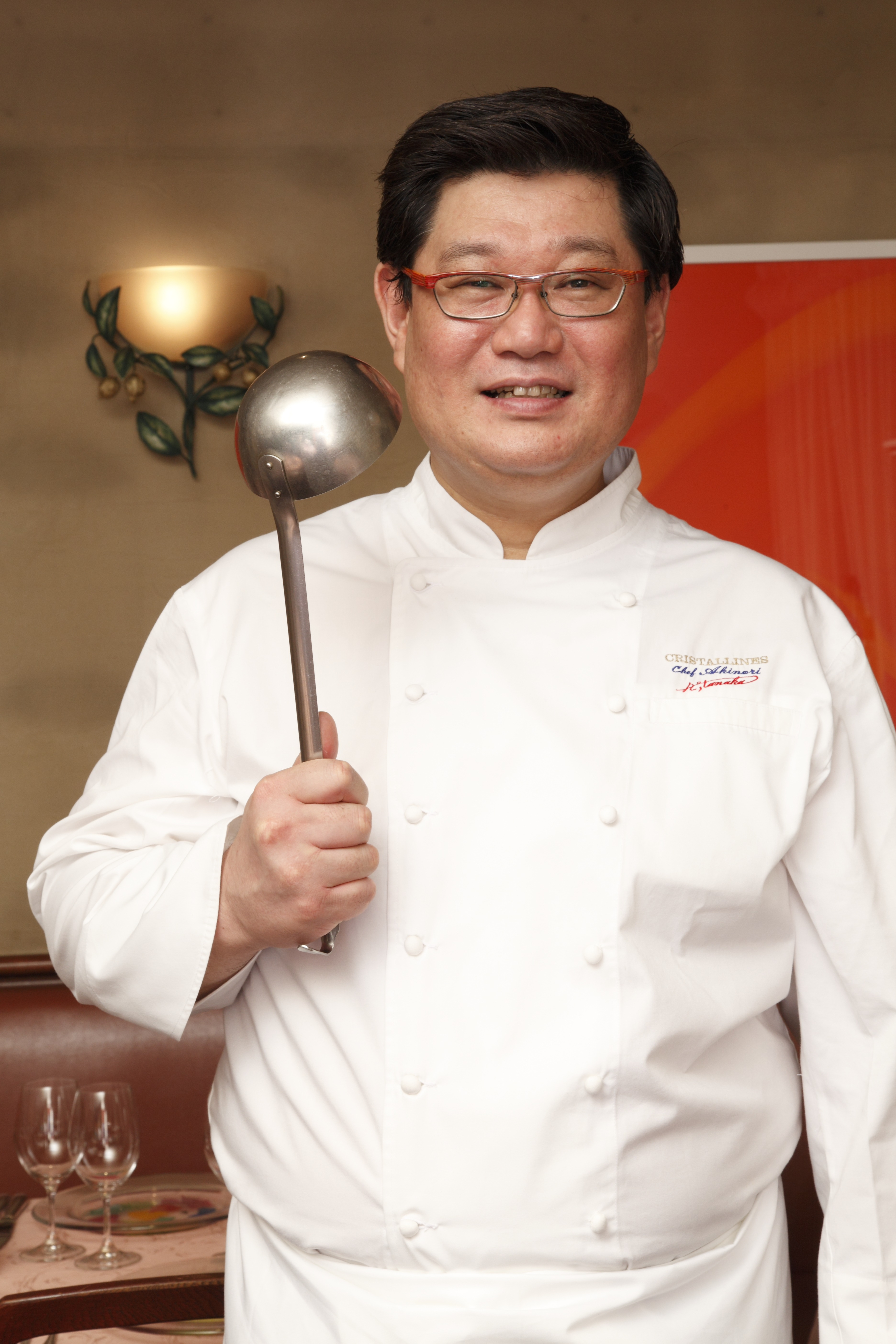 田中彰伯 クリスタリーヌにて撮影